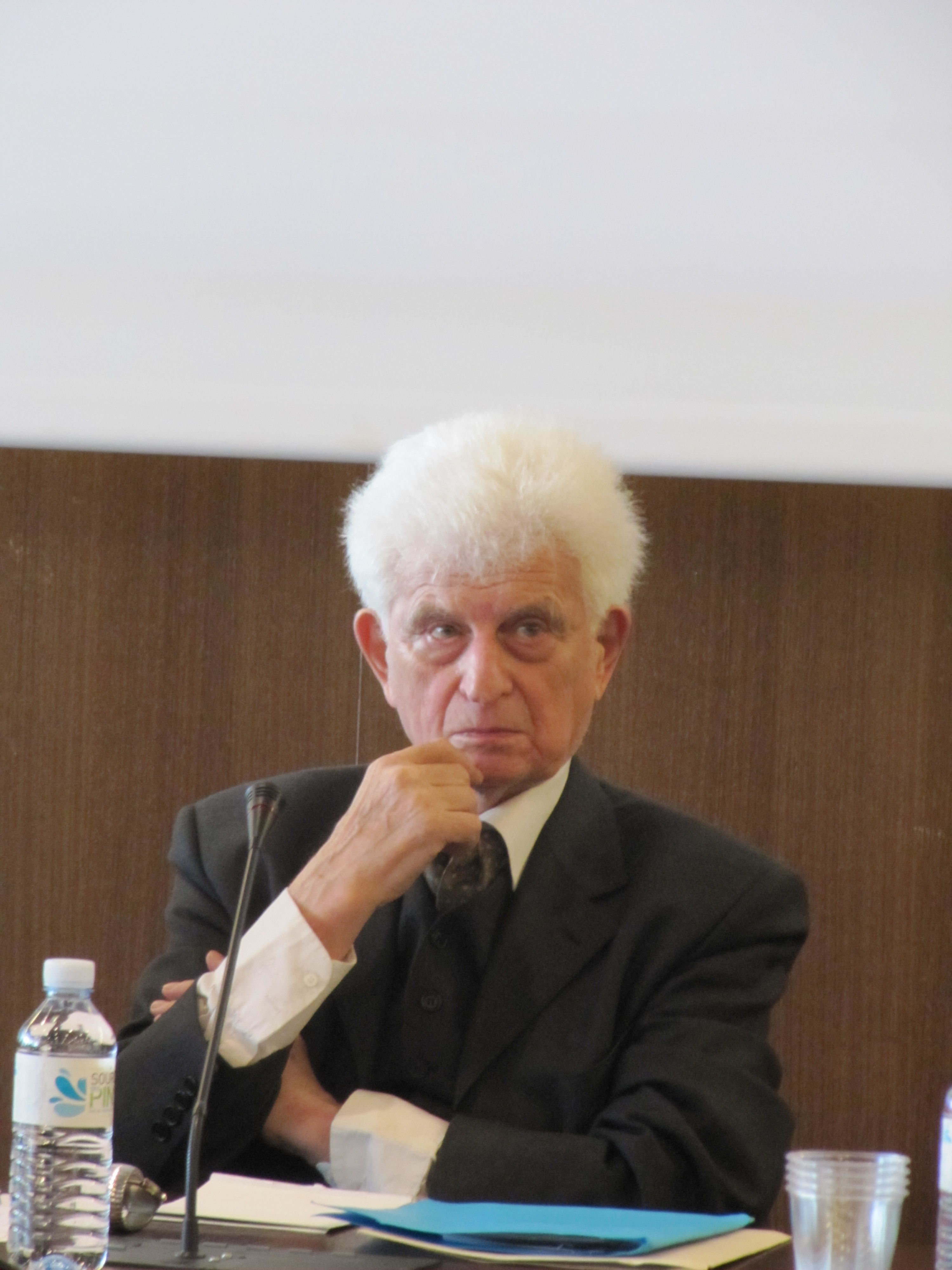 Jean Bollack en février 2011